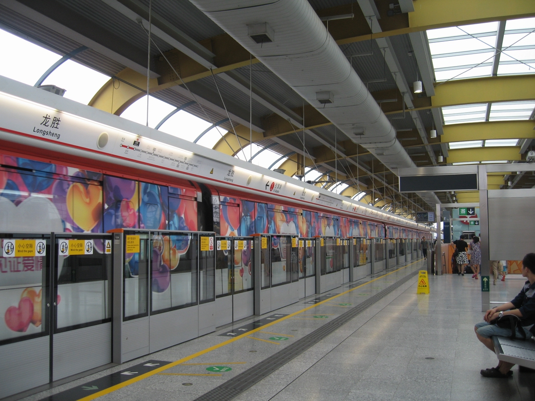 深圳地铁龙胜站站台